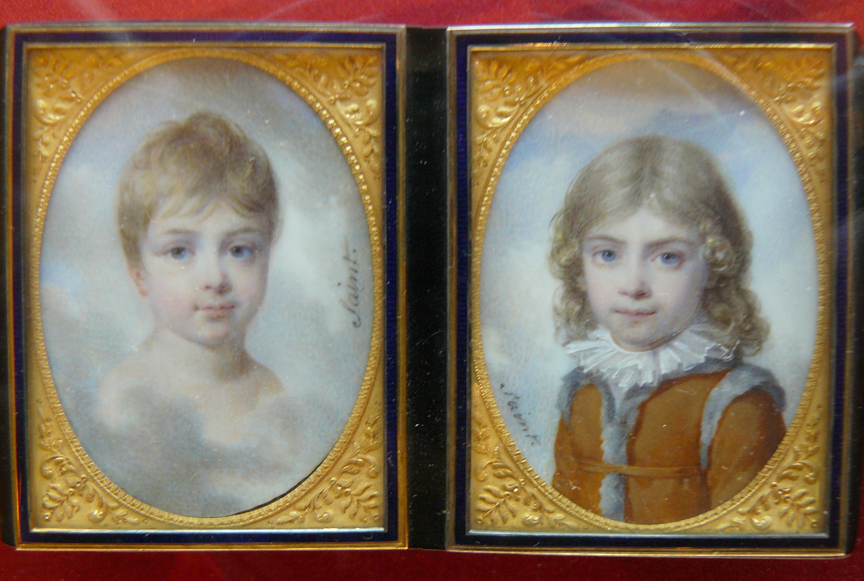 Miniatures sur émail de Daniel Saint (Paris, vers 1798-1809, Les enfants de Lucien Bonaparte, orfèvre Adrien Vachette. Or, écaille brune, émail, chaque portrait environ 5 cm x 3 cm. - Musée du Louvre, n°INV OA 7982.